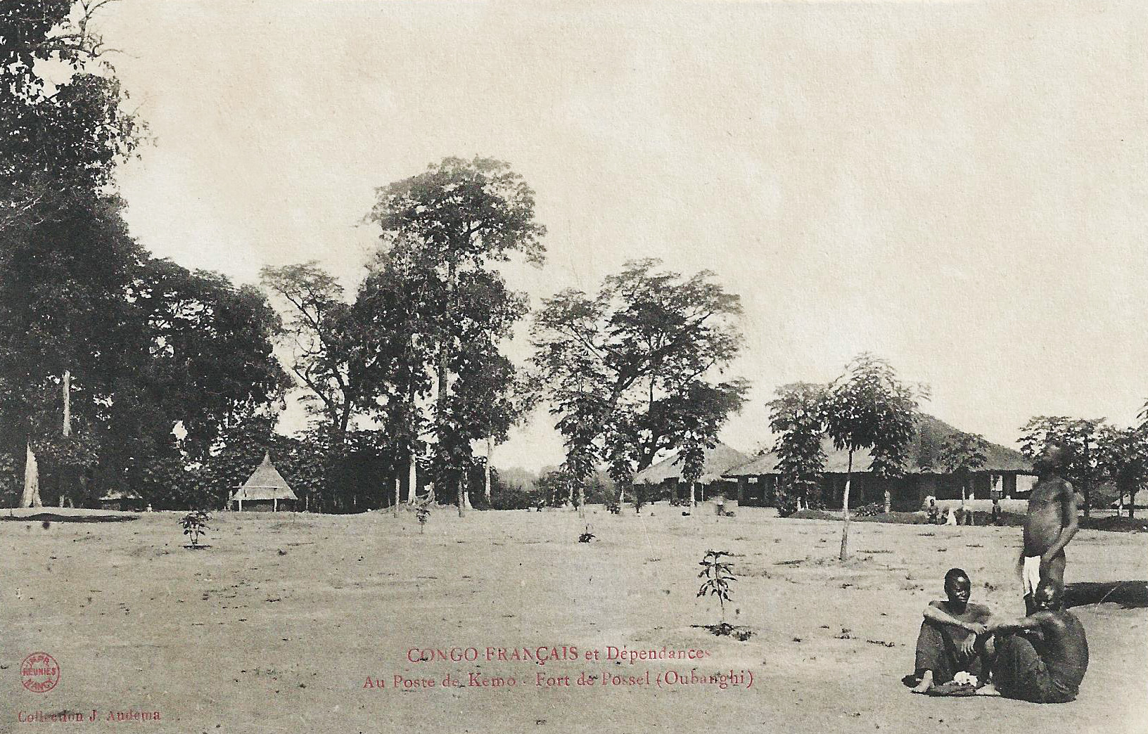 Au poste de Kémo. Fort de Possel (Oubanghi). Collection J. Audema. Phot. A.B. & Cie, Nancy [Albert Bergeret] Congo Français et dépendances